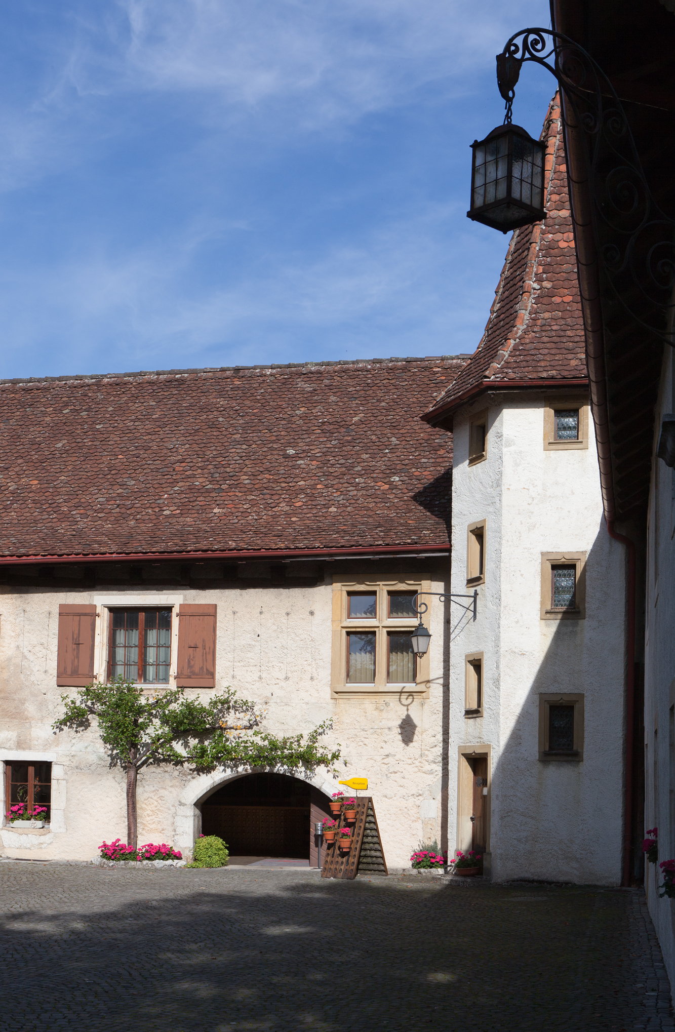 Prieuré St-Pierre à Môtiers (Innenhof)